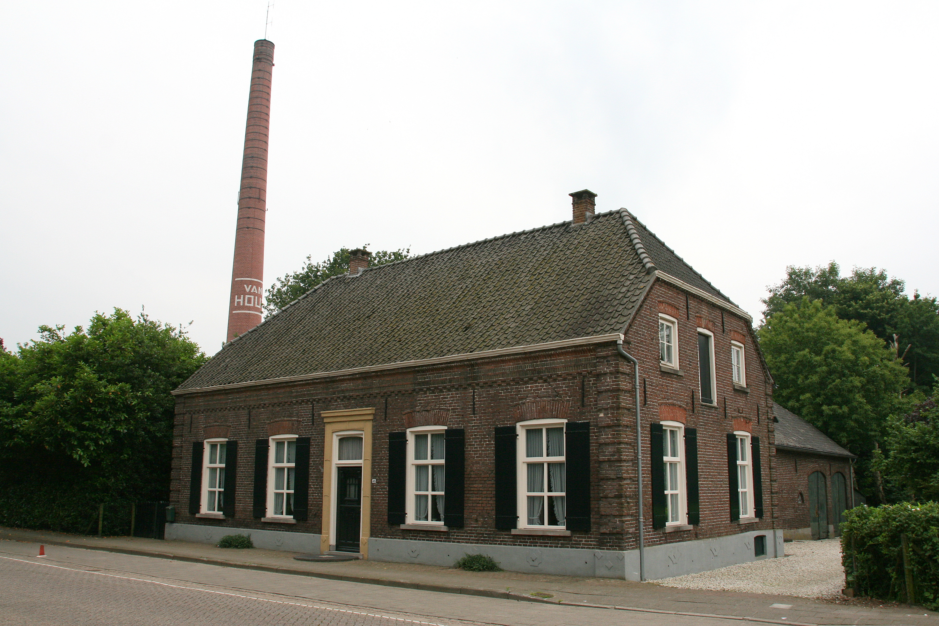 Molenaarshuis uit het vierde kwart van de 19e eeuw. De bijbehorende molen, die aan de Wanrooijseweg stond, is in 1950 afgebroken. Het molenaarshuis bestaat uit twee gedeelten. Het heeft een T-vormige plattegrond. Het woongedeelte in het voorhuis ligt aan de straat en het bedrijfsgedeelte in het achterhuis. De voor- of oostgevel staat aan de Schoolstraat.